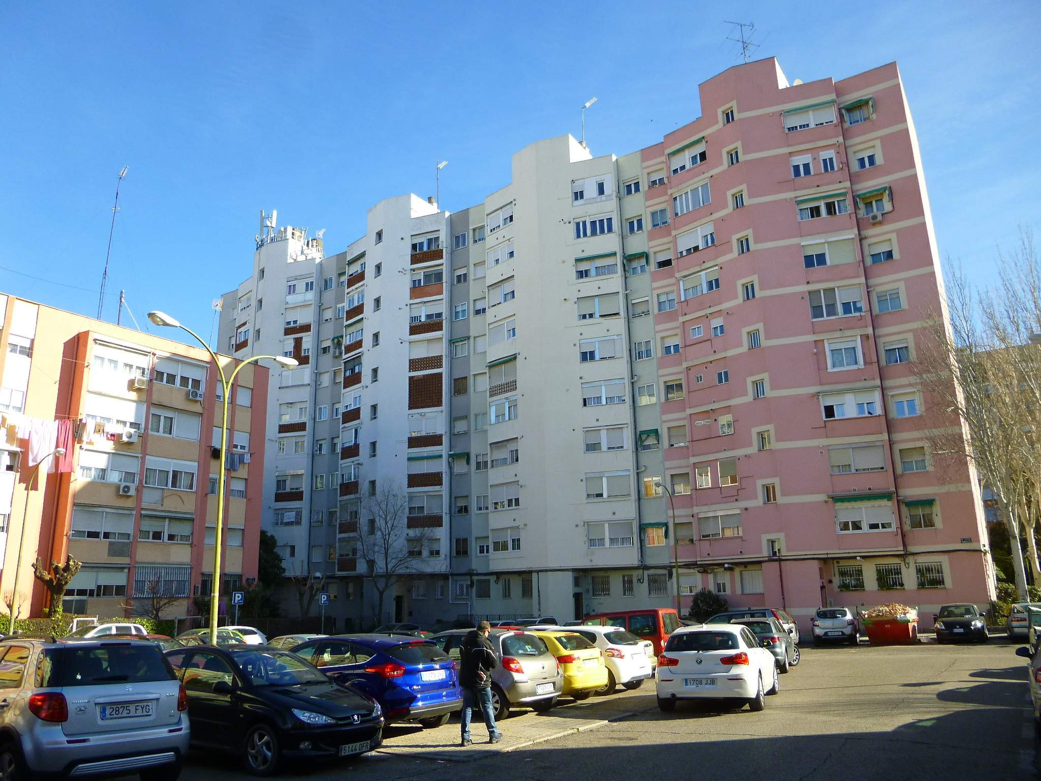 Madrid - Barrio de Pinar del Rey, Distrito de Hortaleza